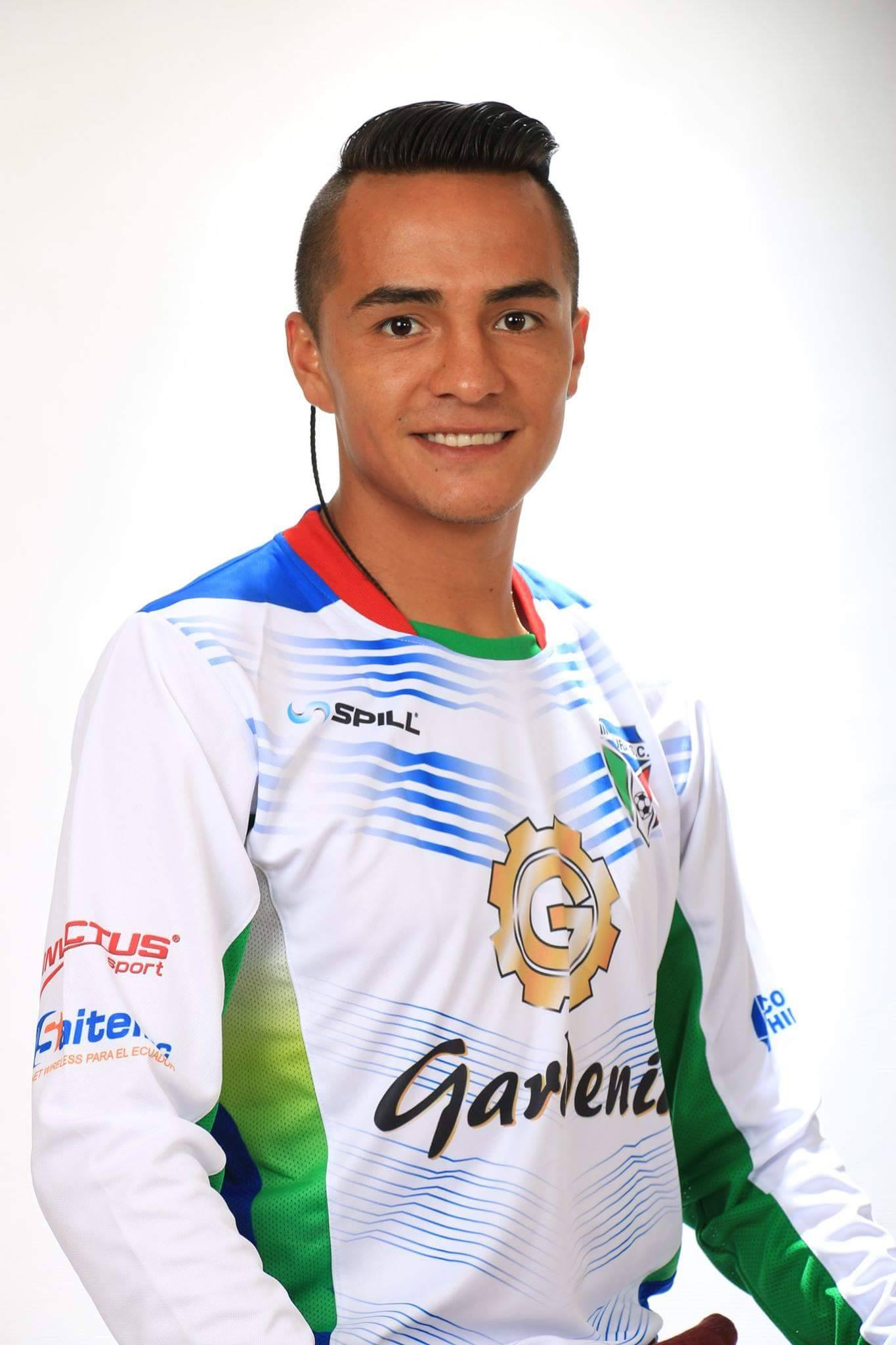 Francisco Mera